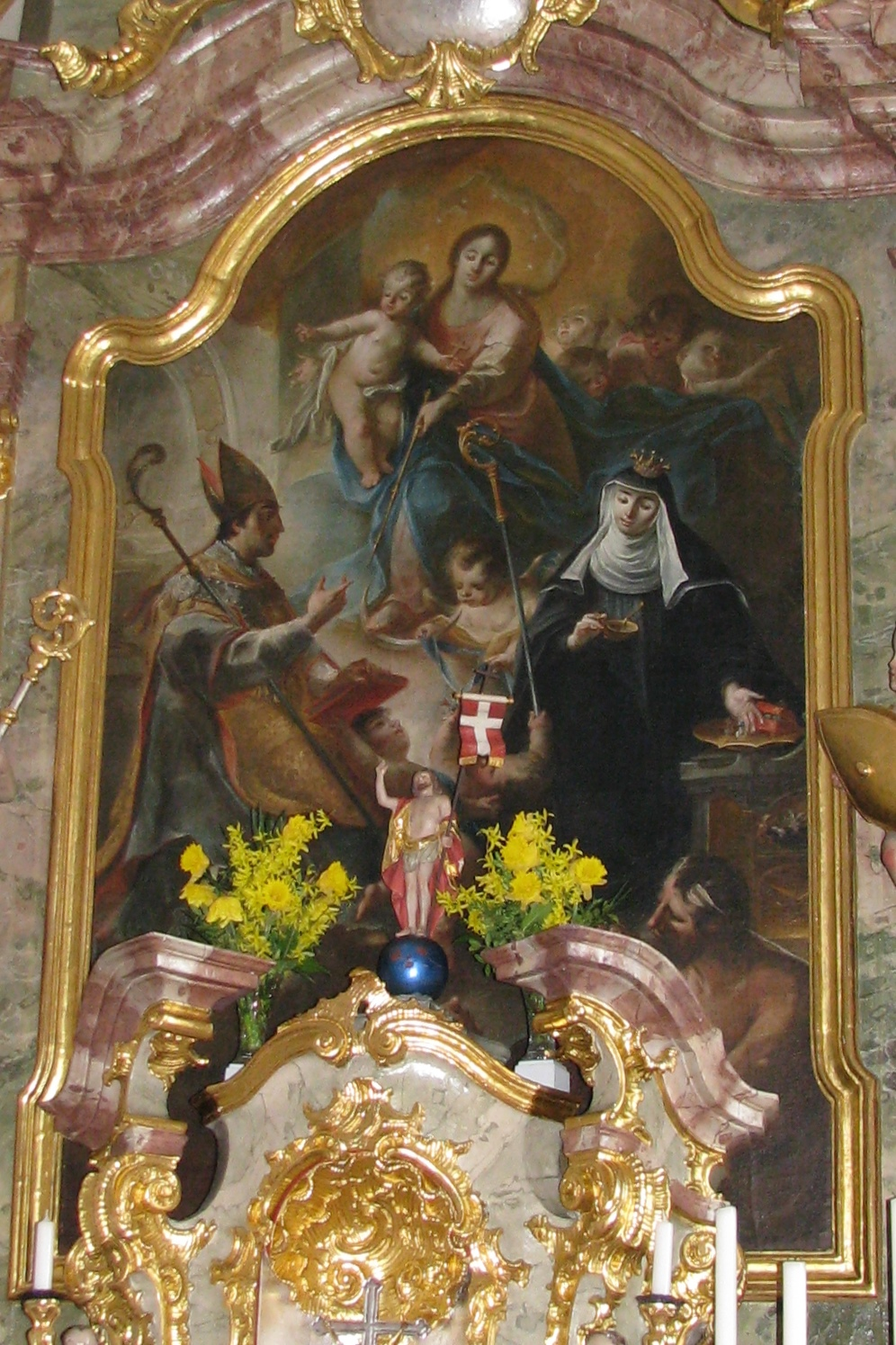 Möning, Ortsteil von Freystadt im Landkreis Neumarkt in der Oberpfalz, Hochhaltarbild